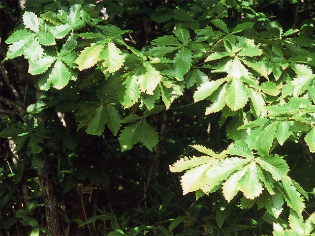 Quercus mongolica var gosseserrata, una especie de roble. Foto por usario Inti-sol en dehesa umeda de Kushro, Hokkaido, julio de 2005. ミズナラ。2005年7月、北海道釧路湿原にて投稿者が撮影。